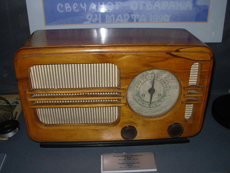 Радипријемник Космај 49 из 1949. Фотографисао Голдфингер